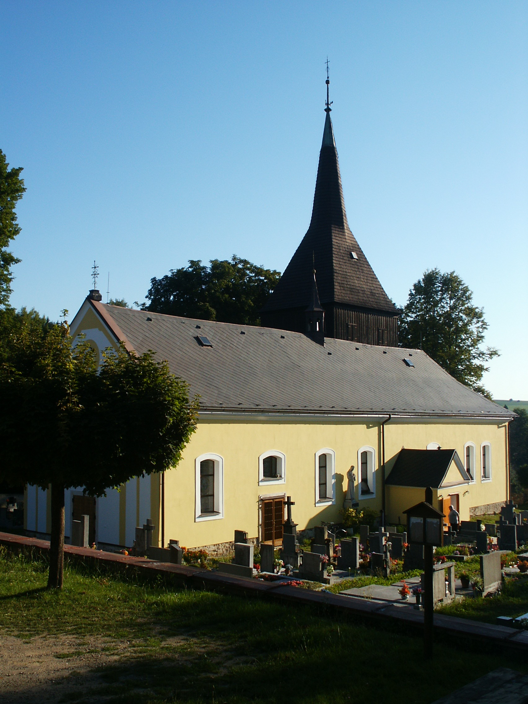 Kostel sv. Markéty (Borová), v obci, Borová - pohled od JZ